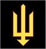 емблема громадської організації "Слава і Честь"